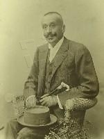 Leopold III. hrabě Podstatský-Lichtenštejn (1840-1902), moravský šlechtic a velkostatkář